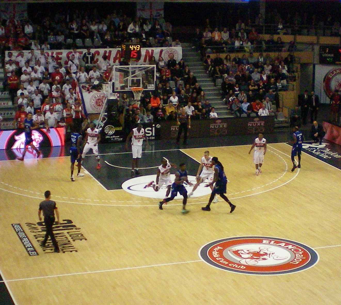 Match de Pro A (saison 2016-2017) entre l'Elan Chalon et Antibes.